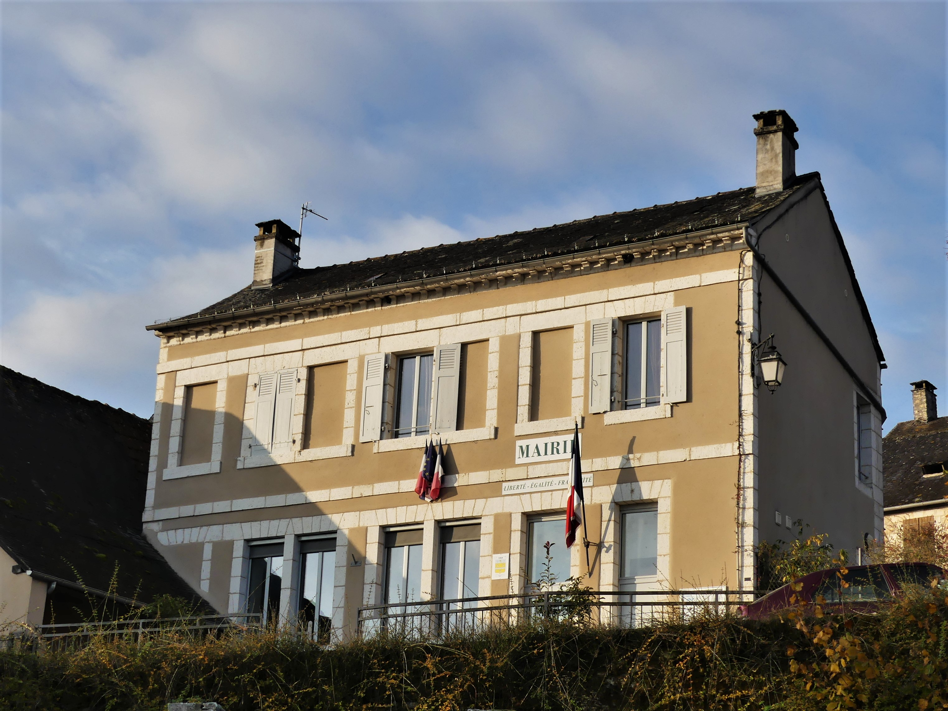 La mairie de Coly, Dordogne, France.